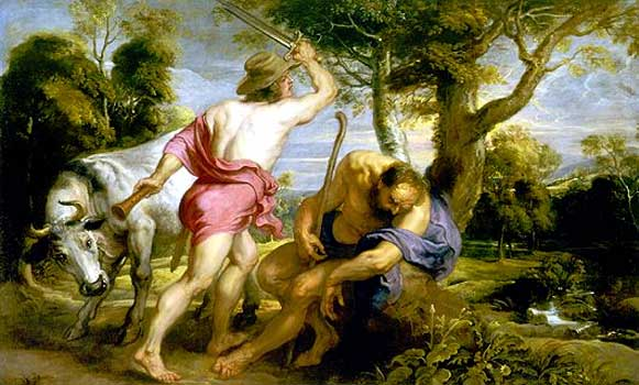 Merkury i Argos